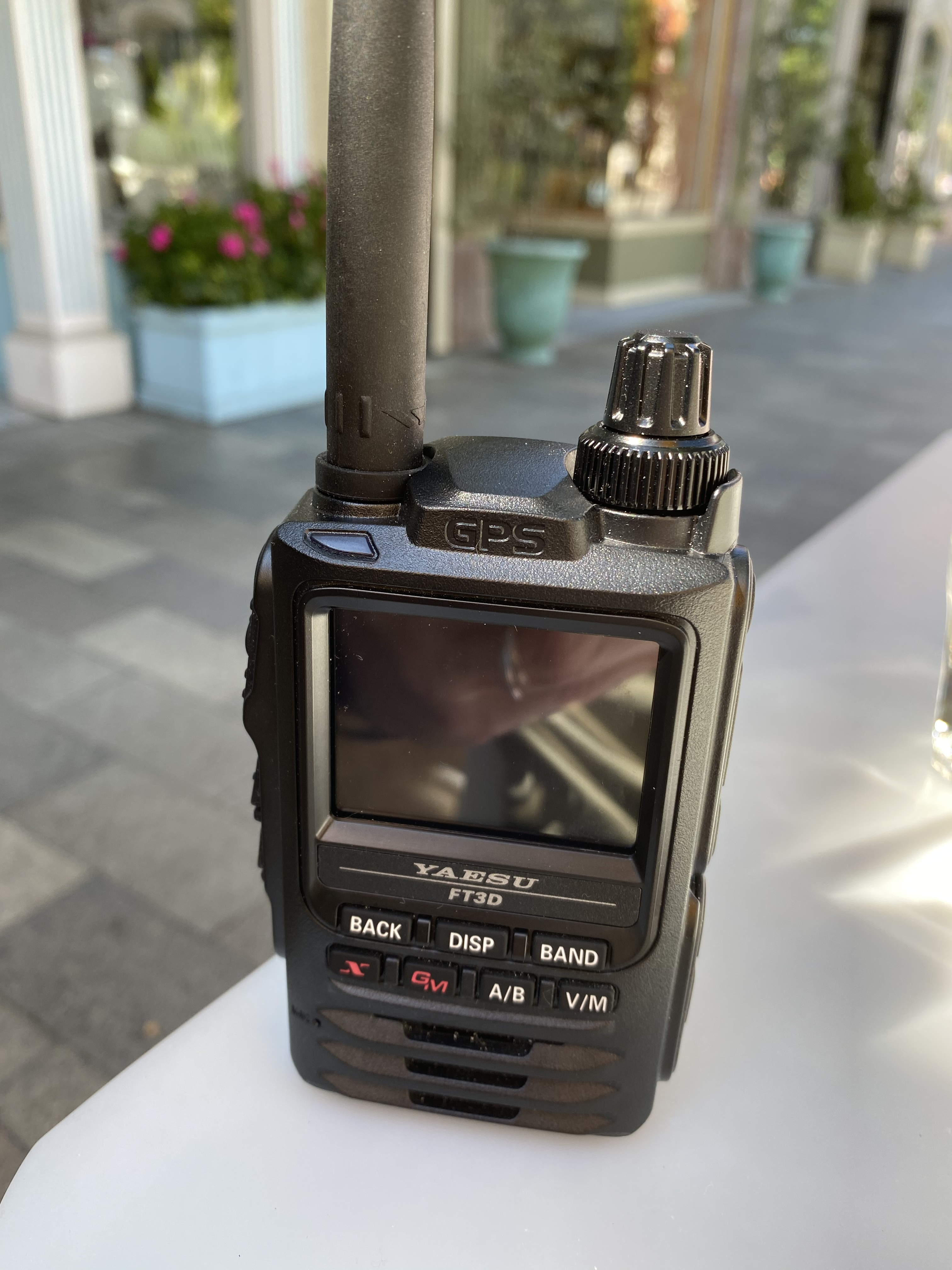 Yaesu FT-3D telsiz